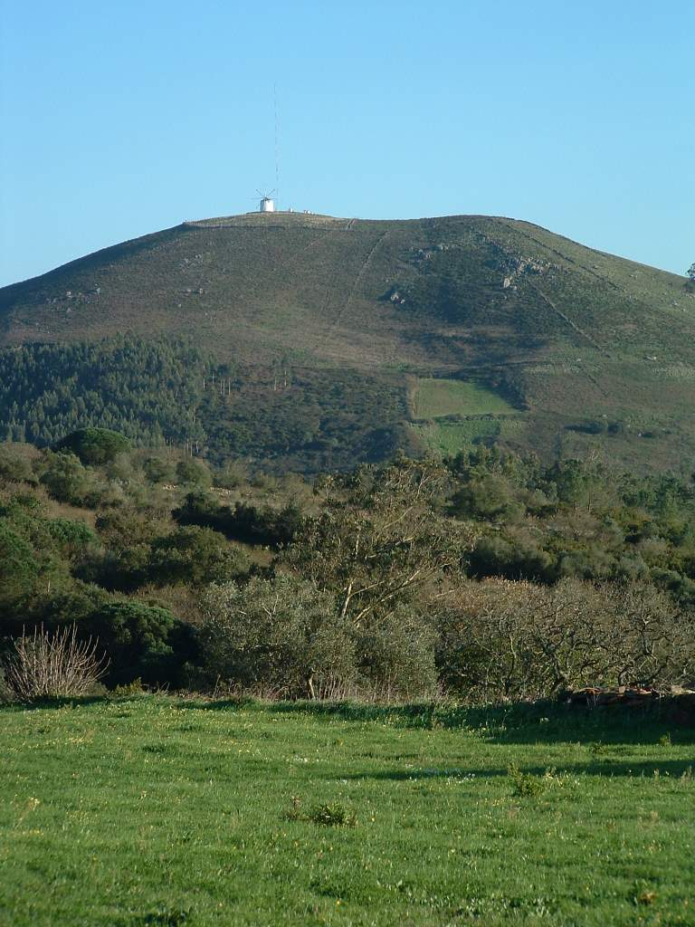 Vista do Monte Manique antes da instalação dos geradores eólicos.